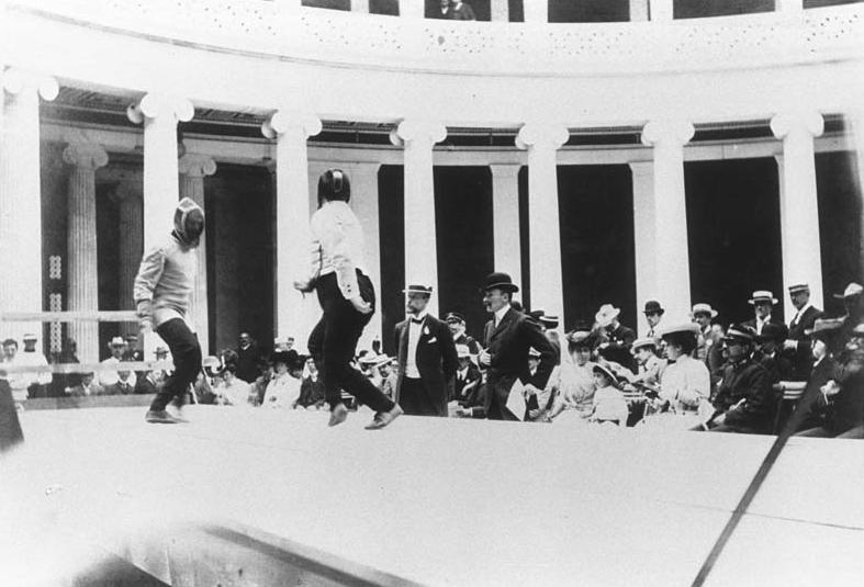 Un incontro di scherma ad Atene 1896